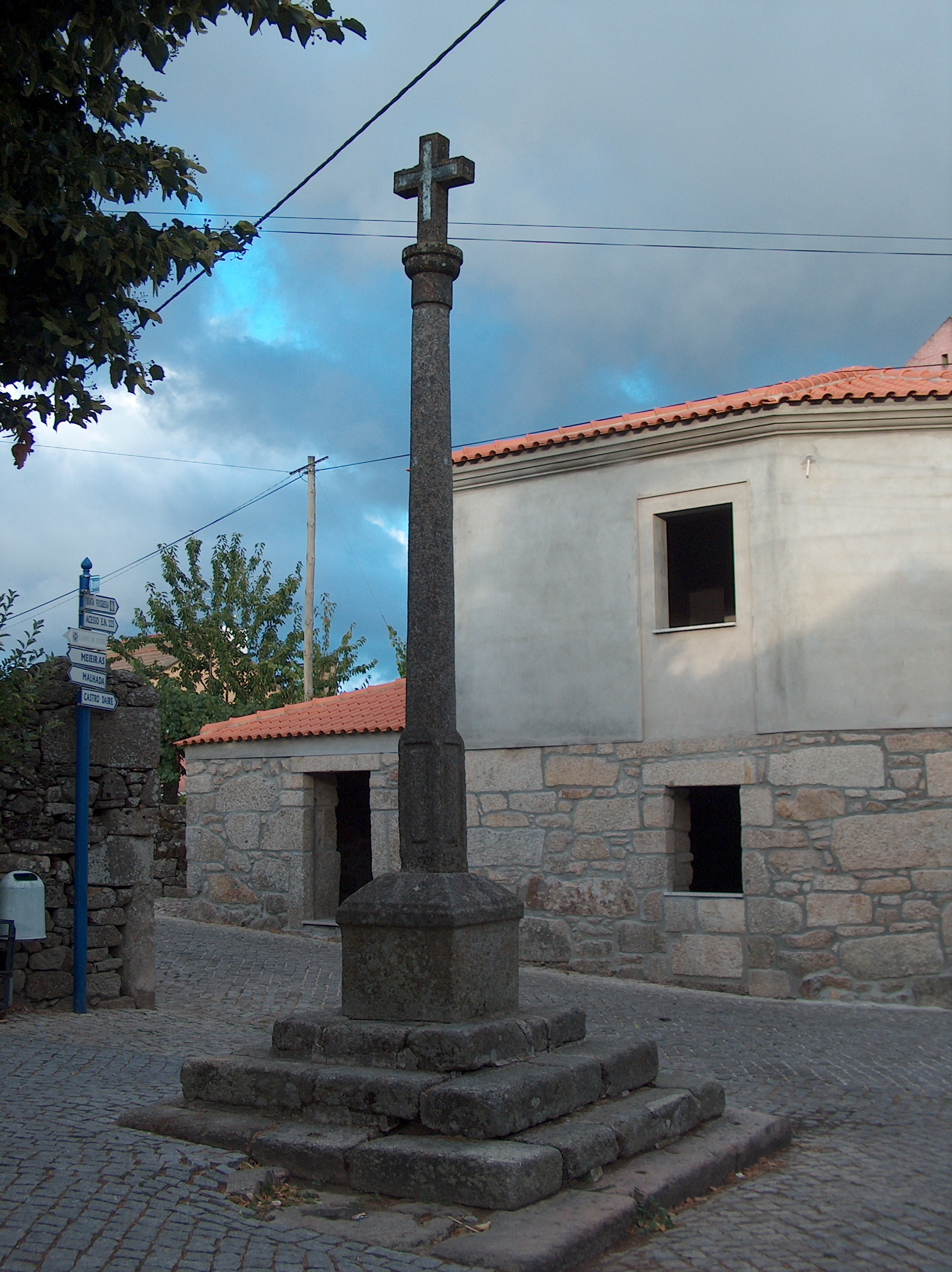 Conjunto de Cruzeiros em Vila Cova a Coelheira This file was uploaded for Wiki Loves Monuments in Portugal with the unique identifier 97013488.